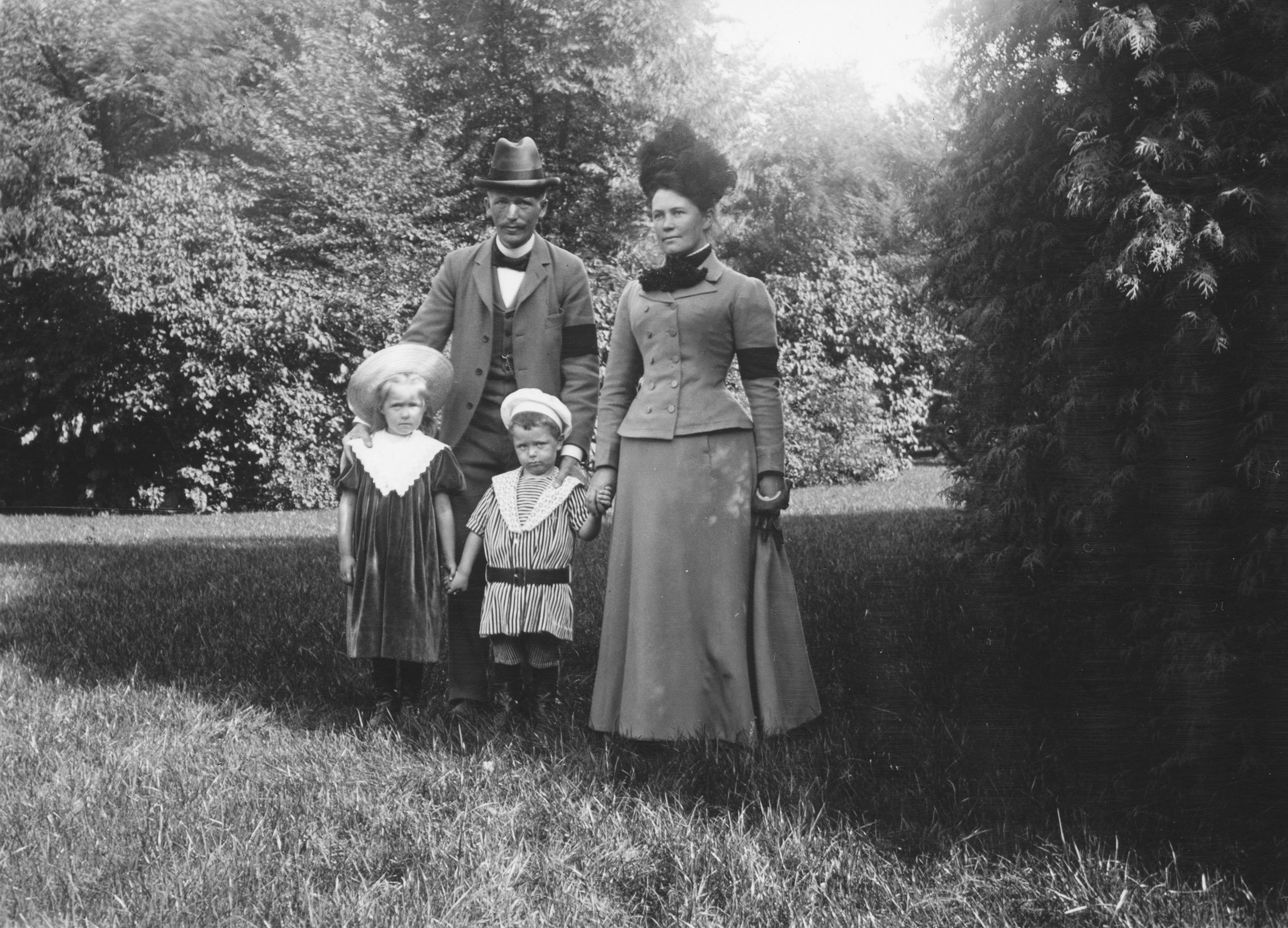 Arkitekt Axel Stenbergs familj i Malmö ca 1901. Sven Rosborns släktfotografier.